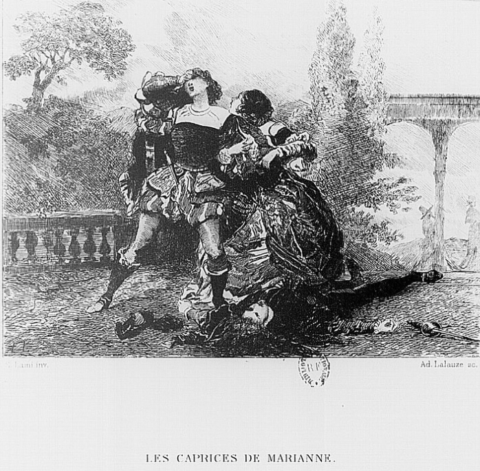 Les caprices de Marianne